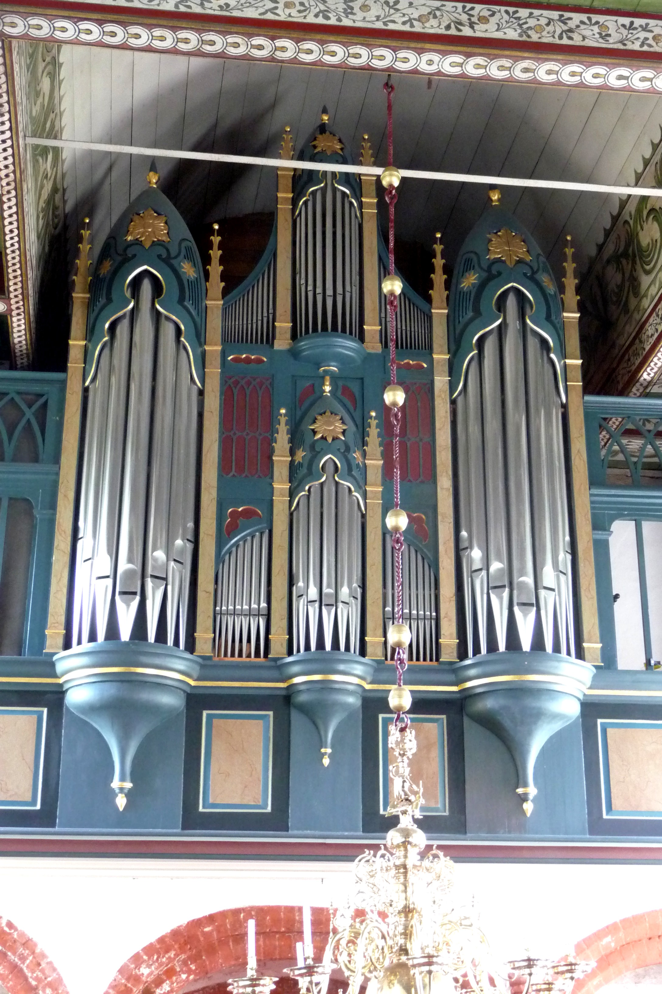 Orgel in der ev.-luth. St.Marien-Kirche Nesse